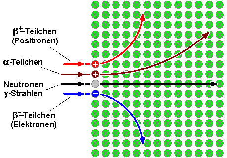 Ablenkung radioaktiver Strahlung in einem Magnetfeld